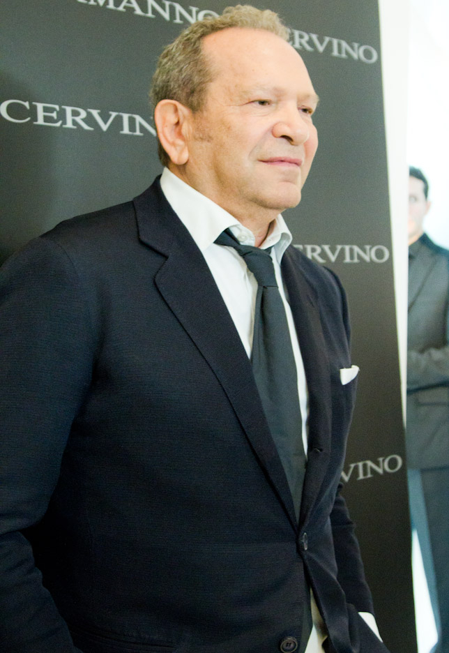 Ermanno Daelli, co-fondatore di Ermanno Scervino